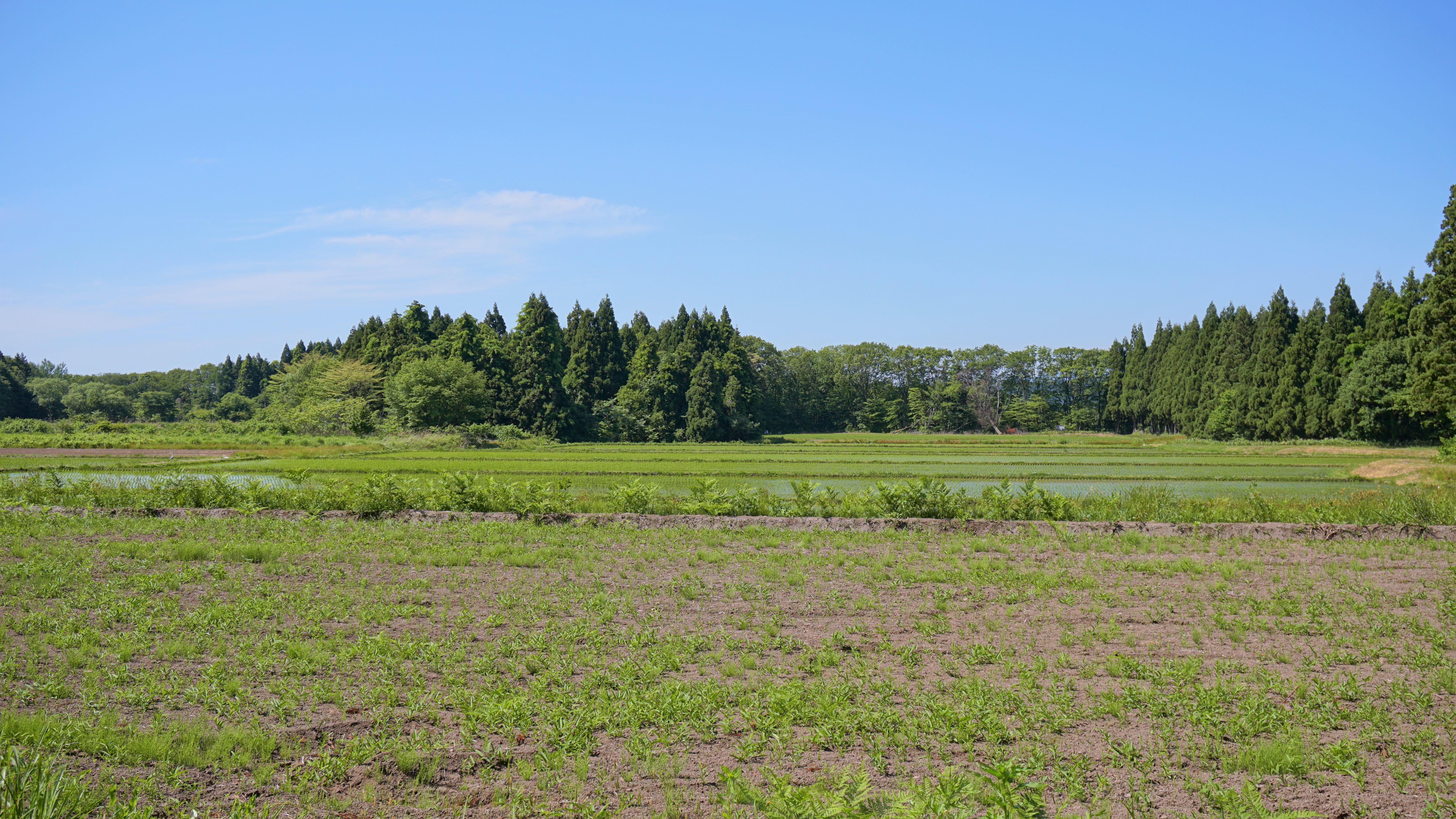 秋田市雄和、椿台城址。大政奉還後の1868年（慶応4年/明治元年）になって秋田藩南部の防衛拠点として建設が始められたが、その半ばにして戊辰戦争の一戦線、秋田戦争のために庄内藩と秋田藩の戦場となった（椿台の会戦）。